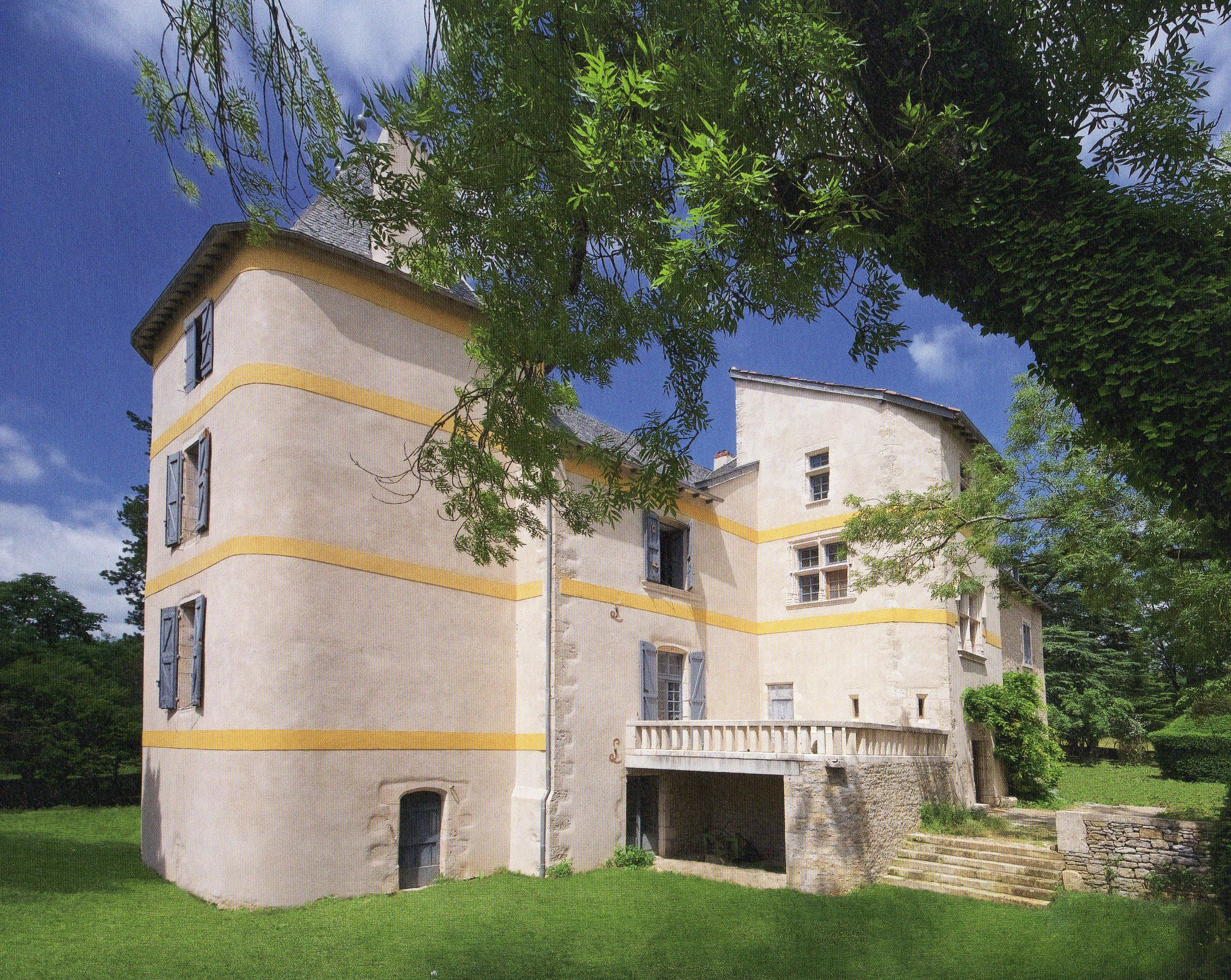 façade sud-ouest. Le château a été rénové en 2017 et 2018